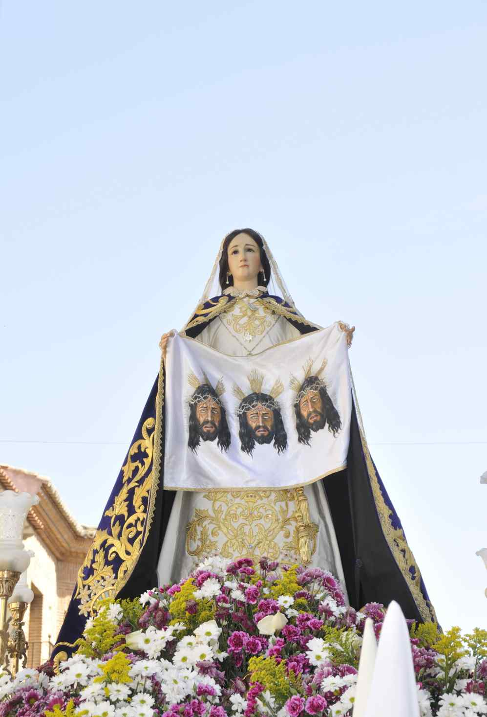 Santa Mujer Verónica de Ocaña (Toledo)